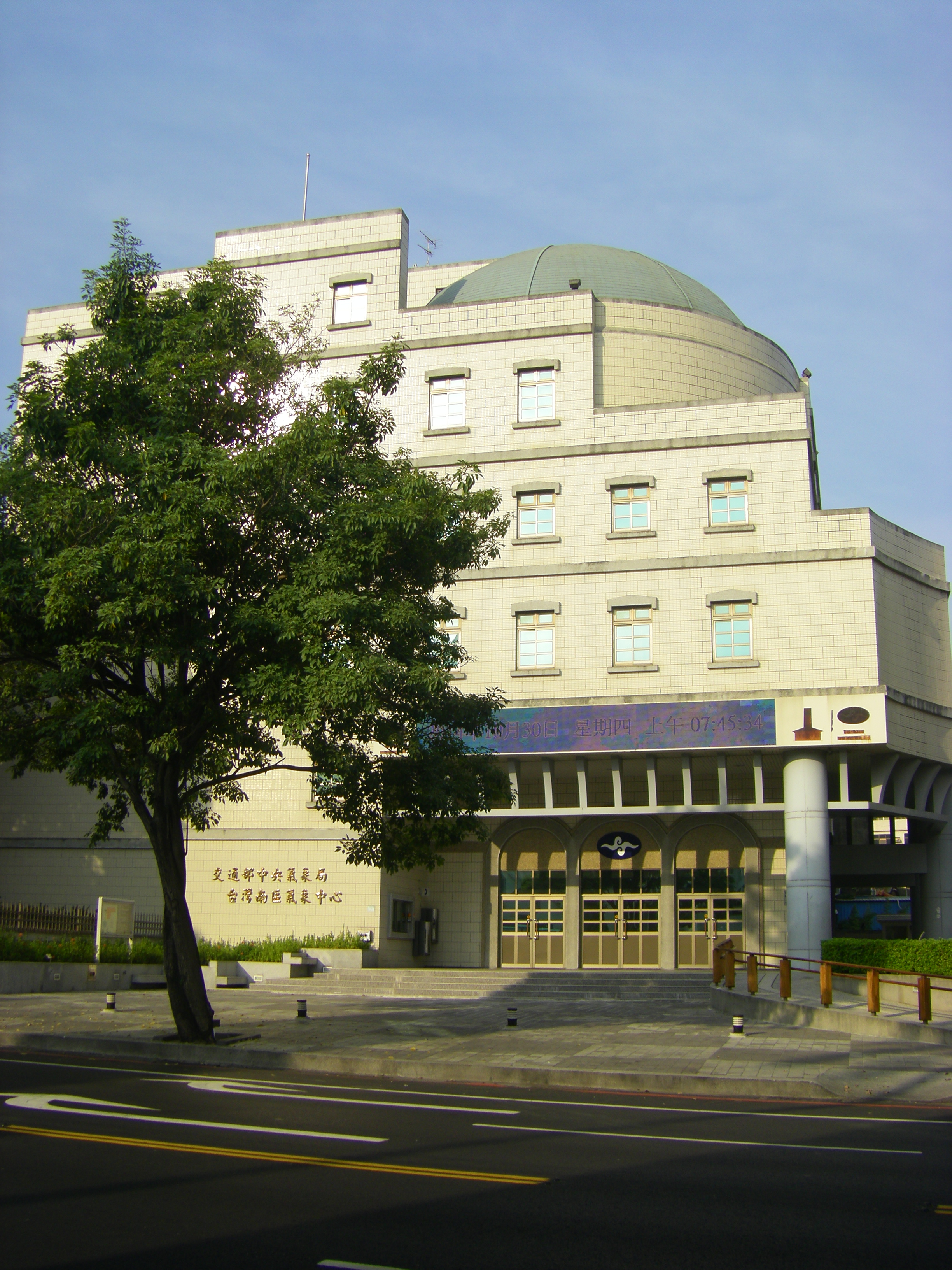 中文（台灣）: 中華民國交通部中央氣象局臺灣南區氣象中心，位於臺灣臺南市中西區公園路21號。